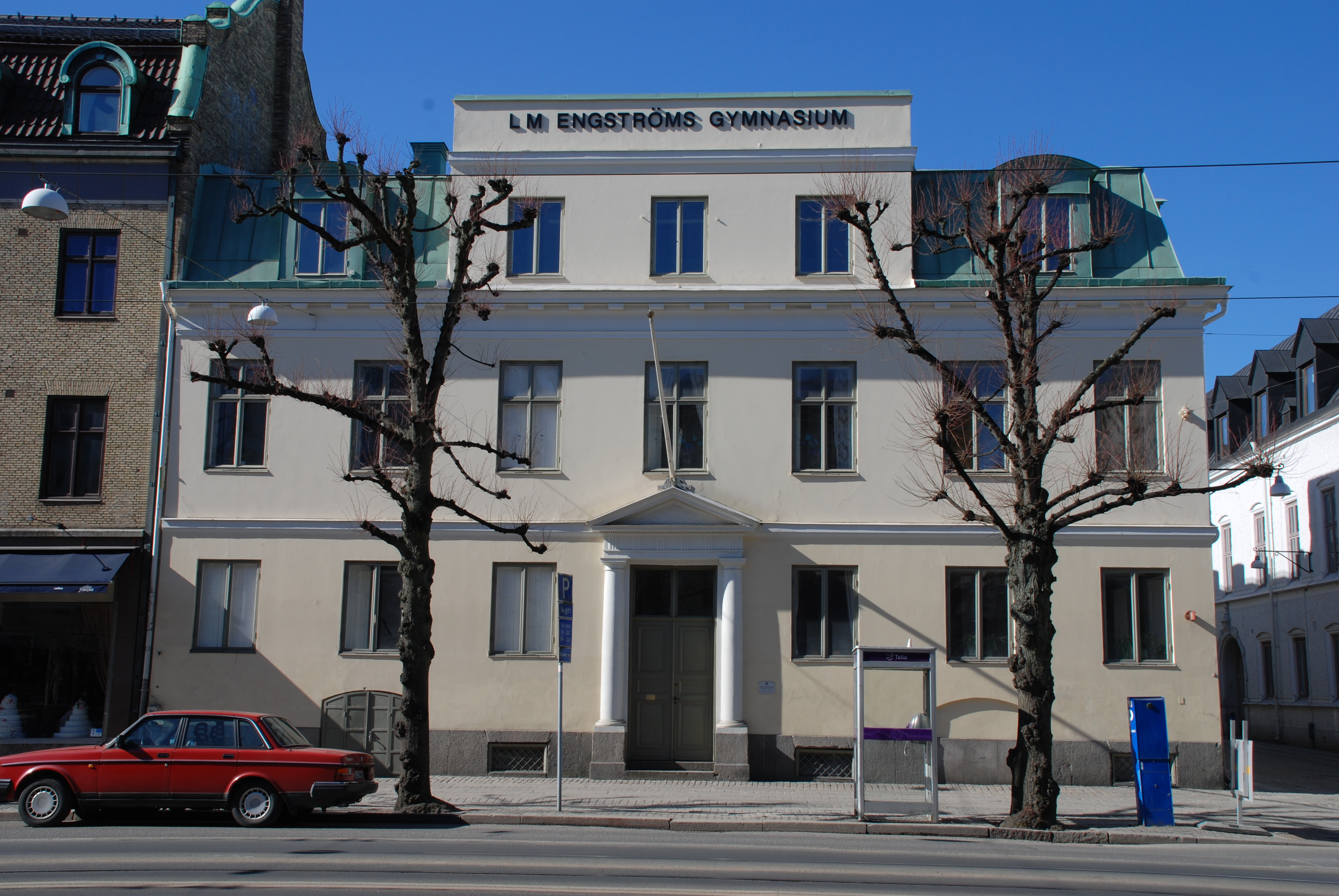 Västra Hamngatan 17, Biskopshuset, i Göteborg. L.M. Engströms gymnasium.